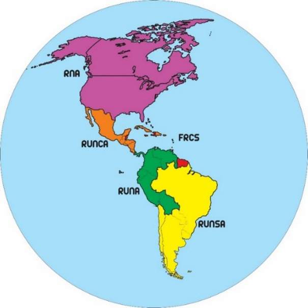 LA AMÉRICA QUE MURIÓ EN BERRUECOS: ¡La historia del futuro perdido! (González-Fernández, A.J. 2017)